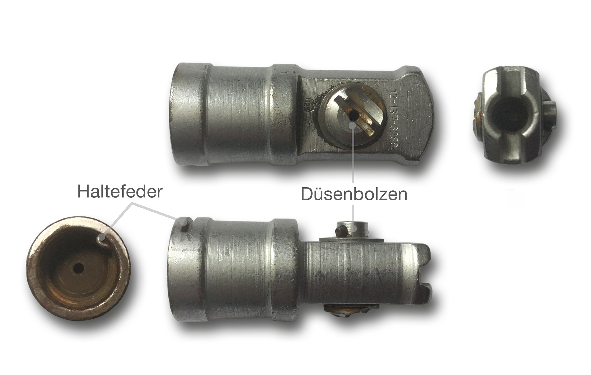 4-Seiten Ansicht des Manöverpatronengerät G3/G36. (Ausführung von 1984) Beim Düsenbolzen ist deutlich, die truppenseitig vorgenommene Abfräsung zu erkennen, die verhindern sollte, daß das MPG individuell von Einzelfeuer auf Feuerstoß umgestellt werden kann.